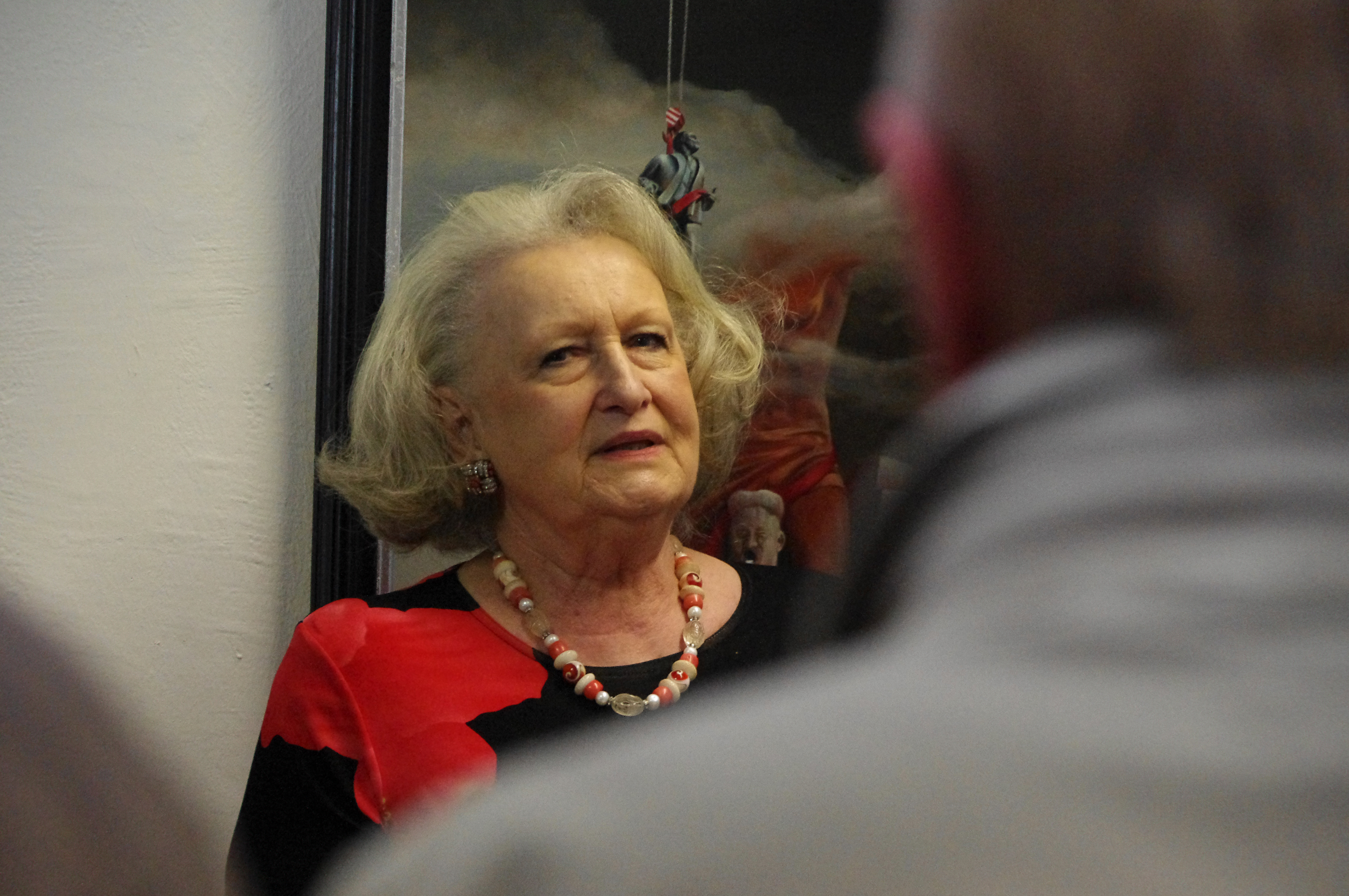 Porträt Rosemarie Bassi